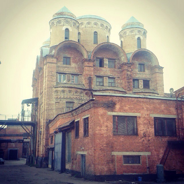 Собор преподобного Серафима Саровского со странноприимным домом (Москва и Московская область, Серпухов, улица Пушкина, 45, территория СеАЗ)